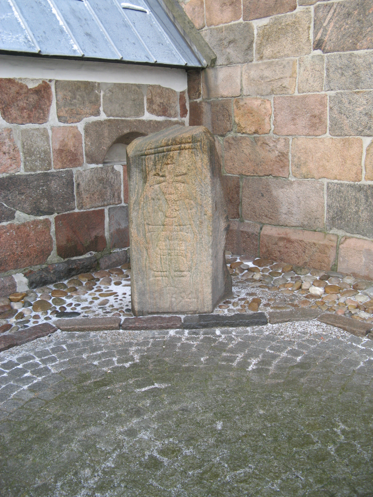 Jerne Kirke, Jerne sogn, Esbjerg kommune (former: Skads Herred, Ribe Amt). Bondegravsten opstillet ved kirkens våbenhus.